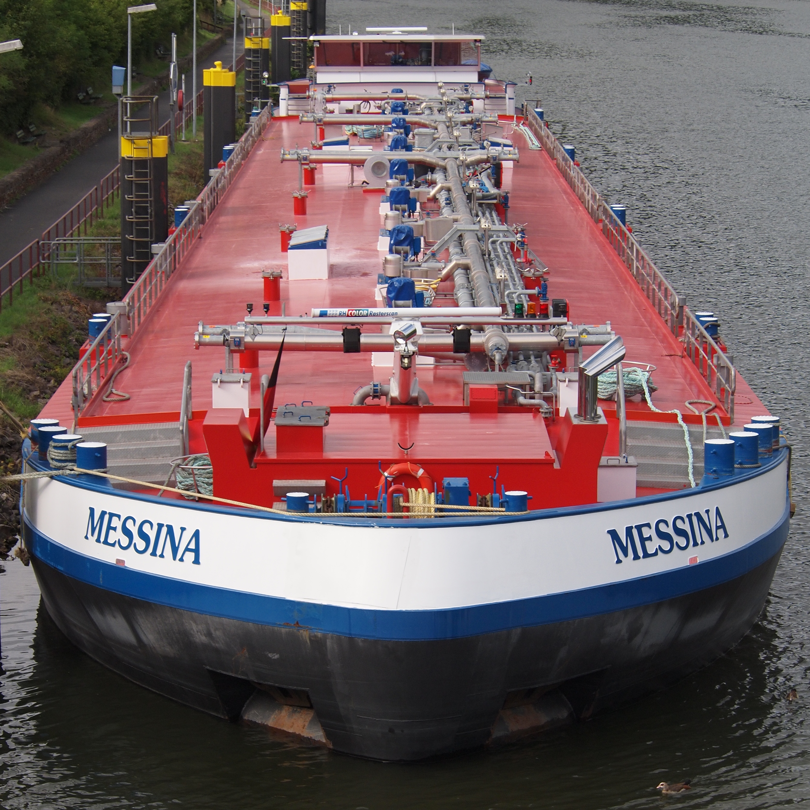 Tankschiff Messina auf der Mosel in Karden